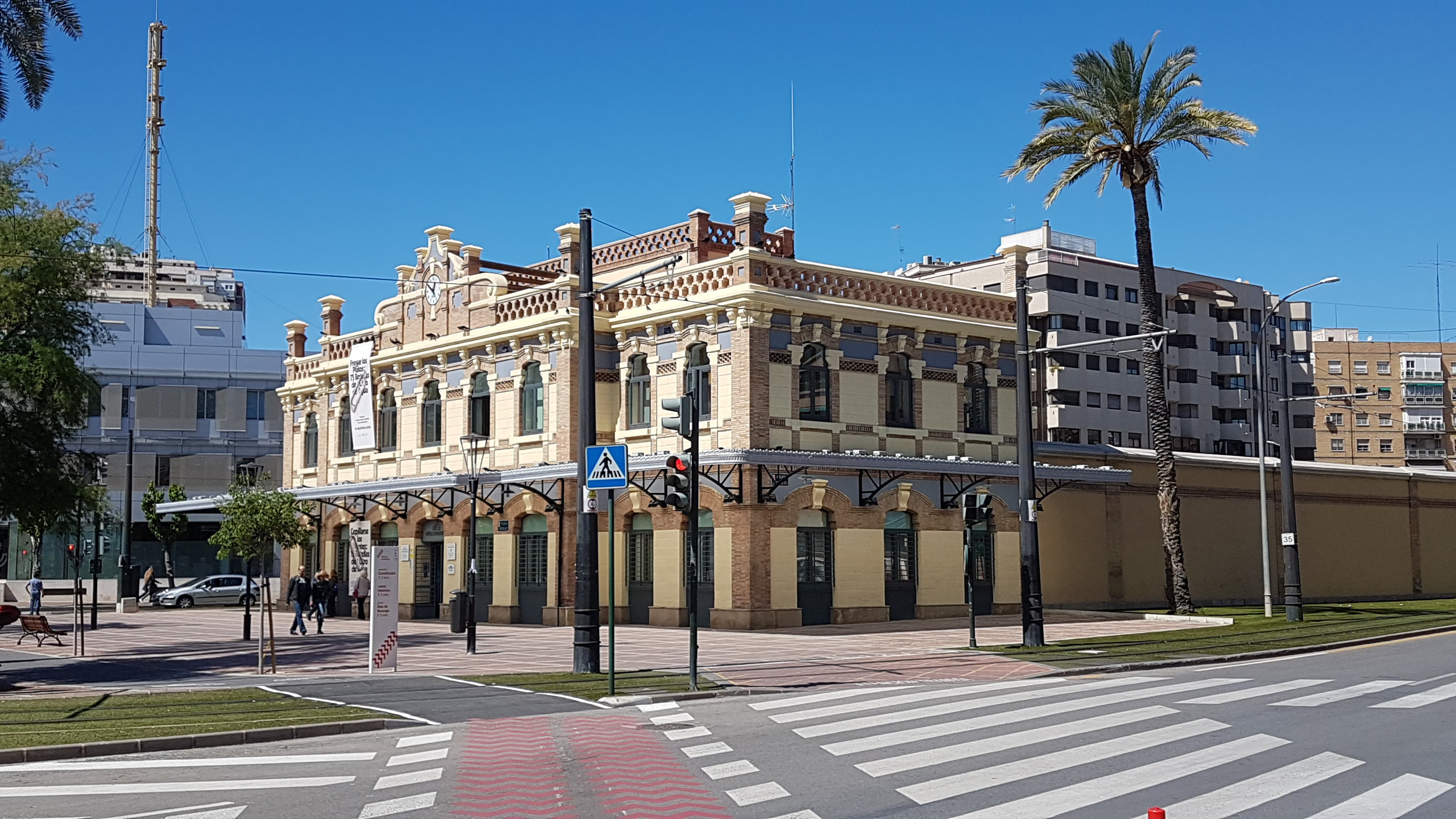 Antigua estación de Zaraiche de Murcia (España)